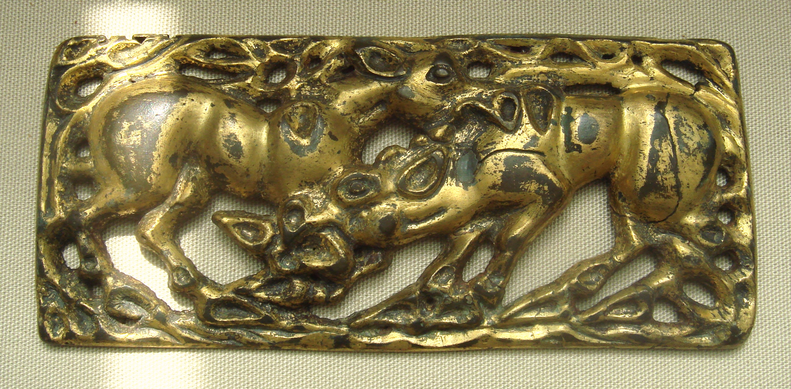 Belt Buckle Ordos 3rd-1st Century BCE